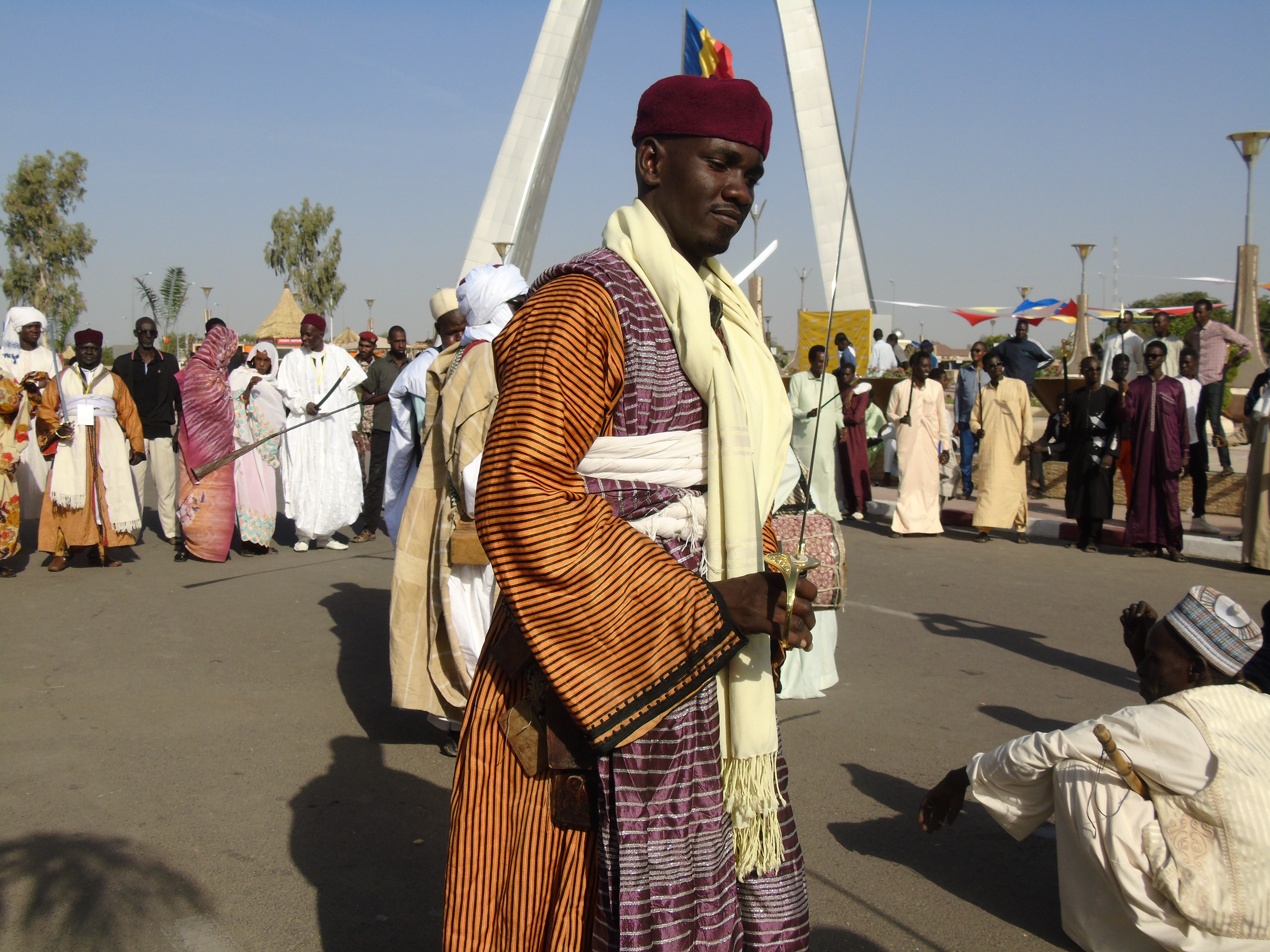 Danse traditionnelle de la province du Kanem lors du festival Dary édition 2018 à N'Djamena